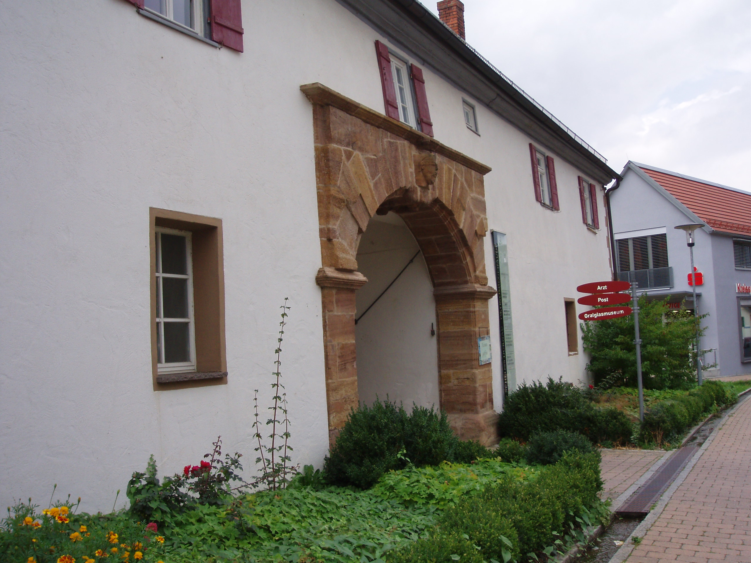 Torhaus des ehemaligen Wasserschlosses Dürnau